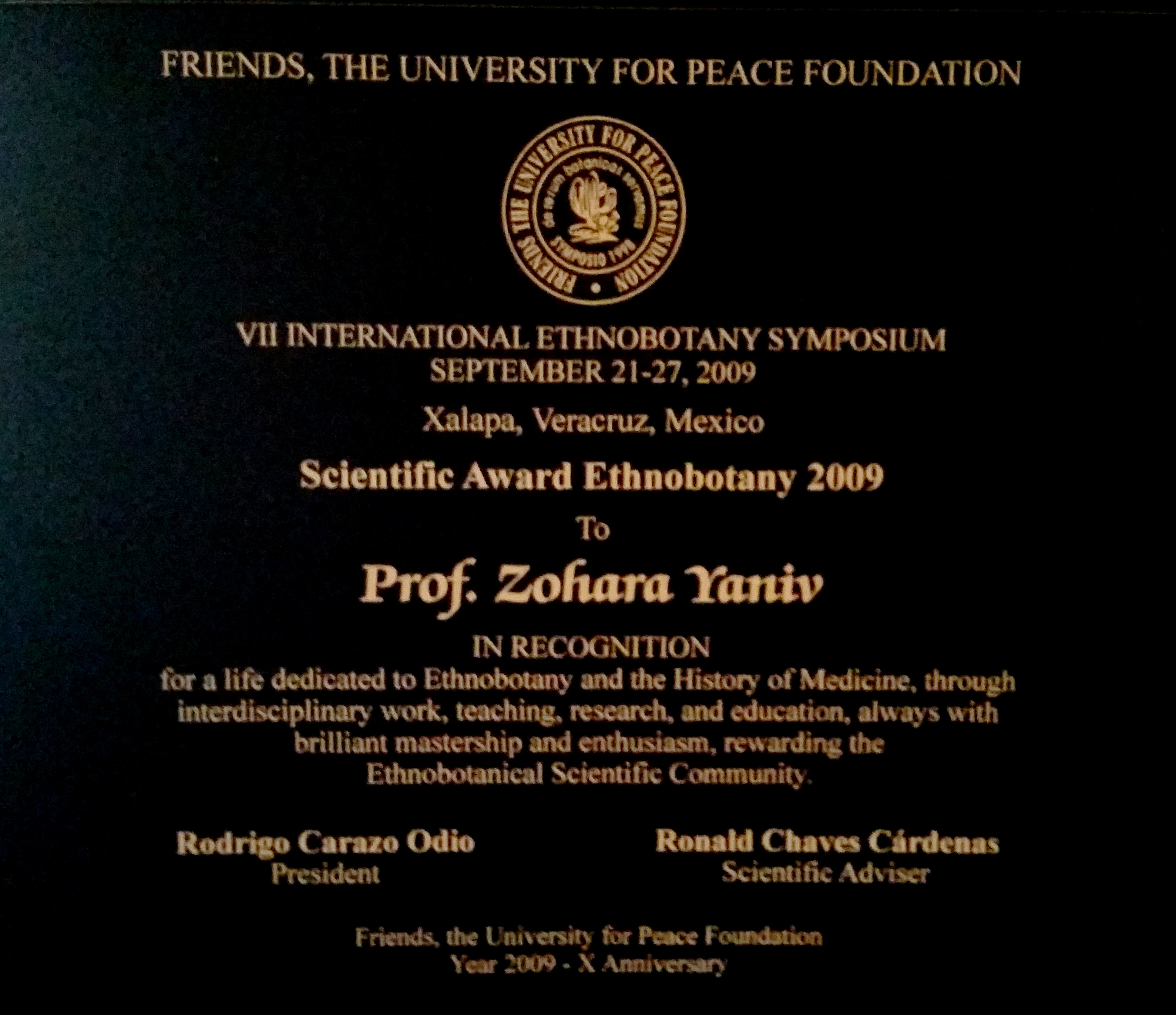 Distinguished Scientist Award